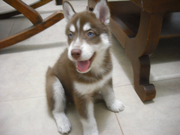 Luna-Lunera,, Husky Siberiano Hembra de mes y medio de nacida.